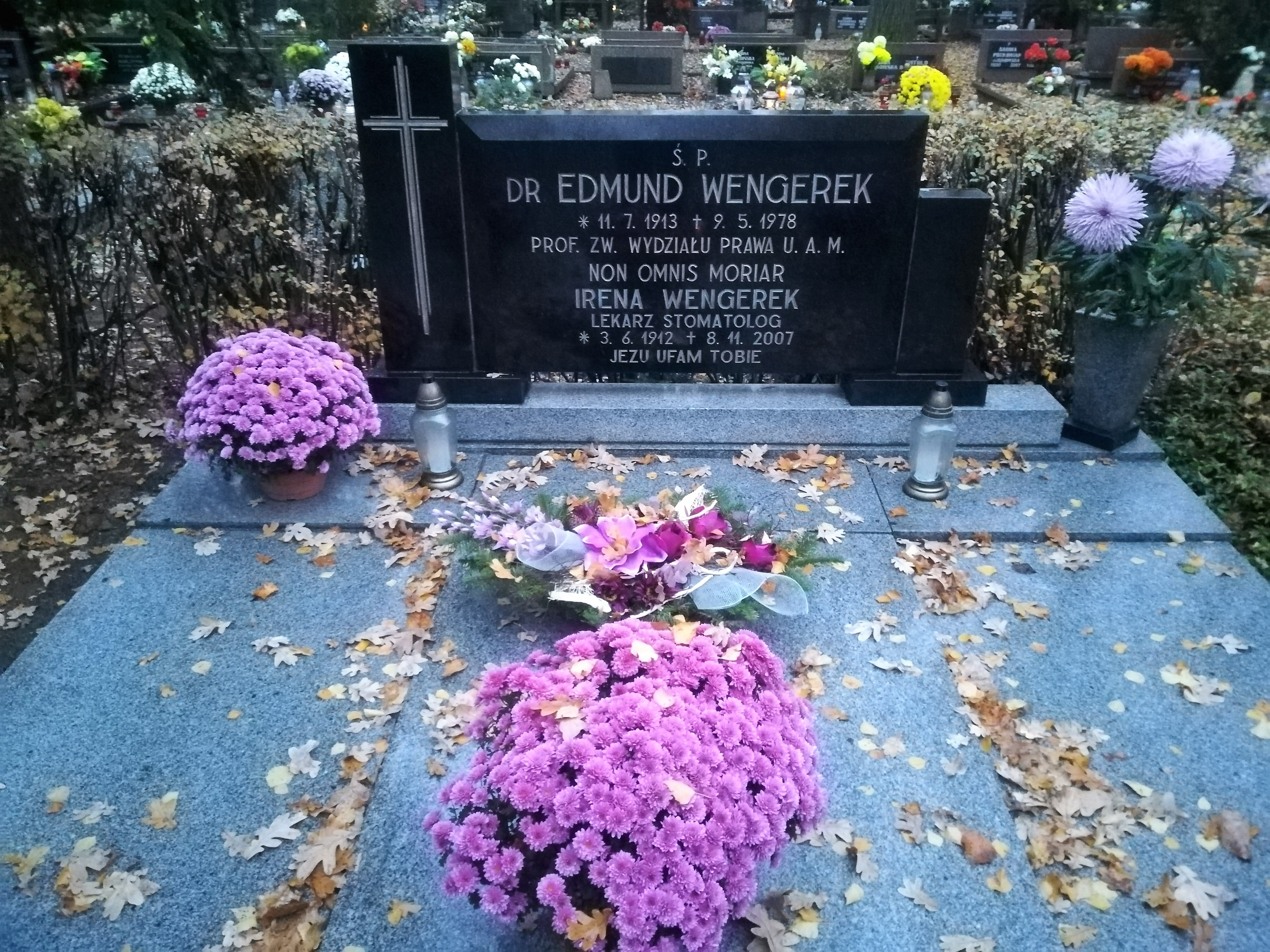 Grób Edmunda Wengerka na Junikowie w Poznaniu.